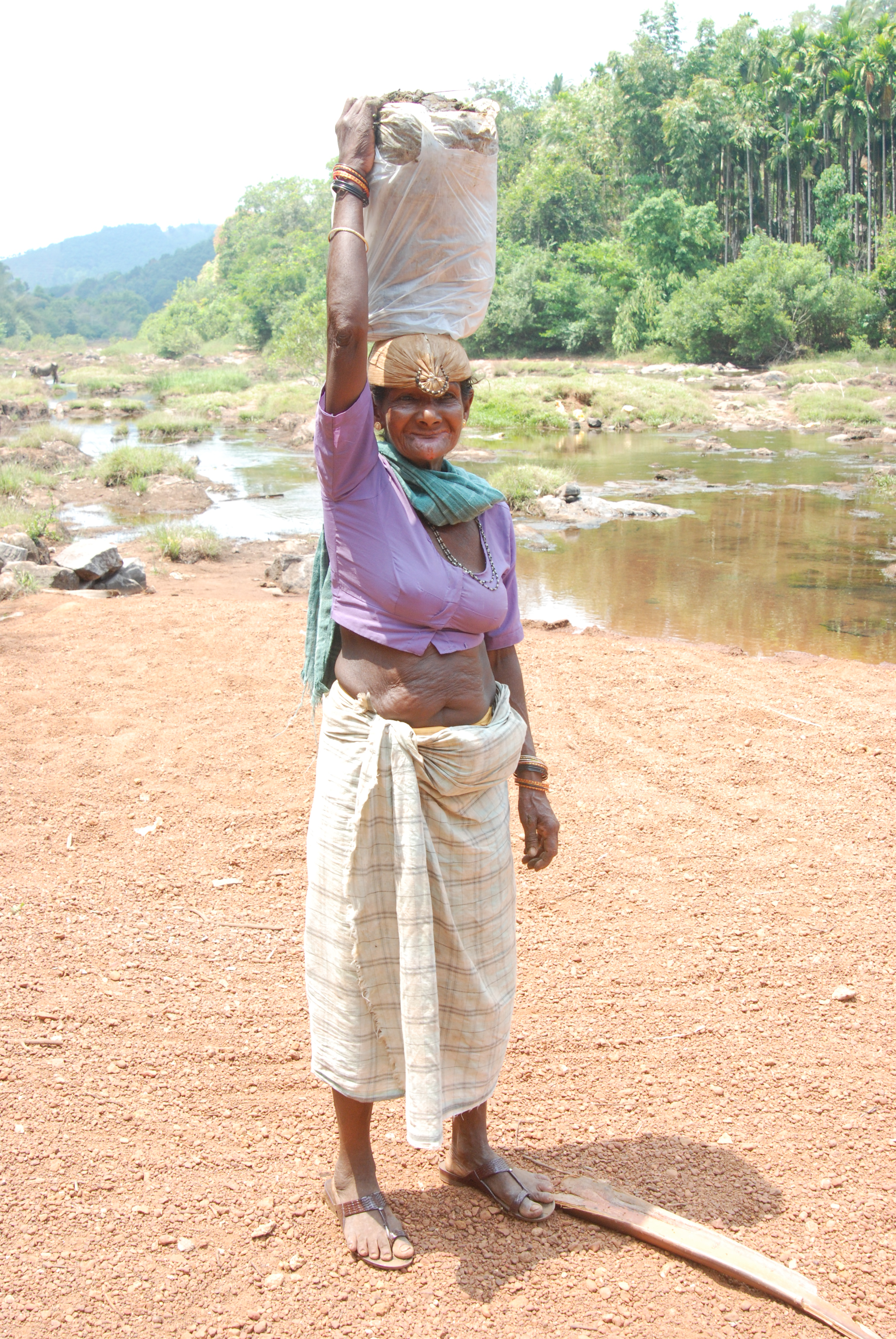 പാളത്തൊപ്പിയും വലിയ മടിശീലയും കഴുത്തിൽ കല്ലുമാലയും ഉള്ള മാവിലസ്ത്രീ